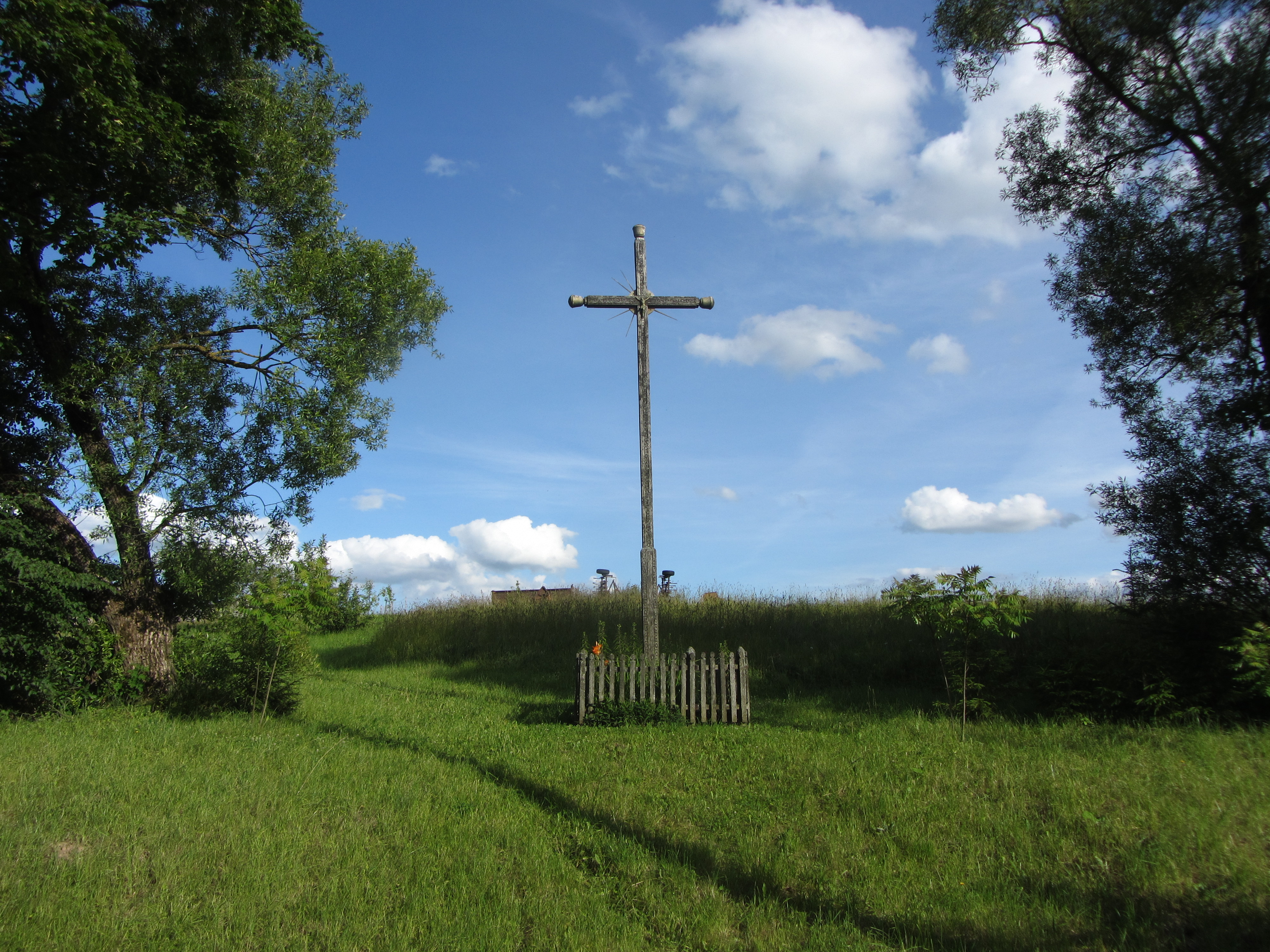 Kančioginas 30182, Lithuania